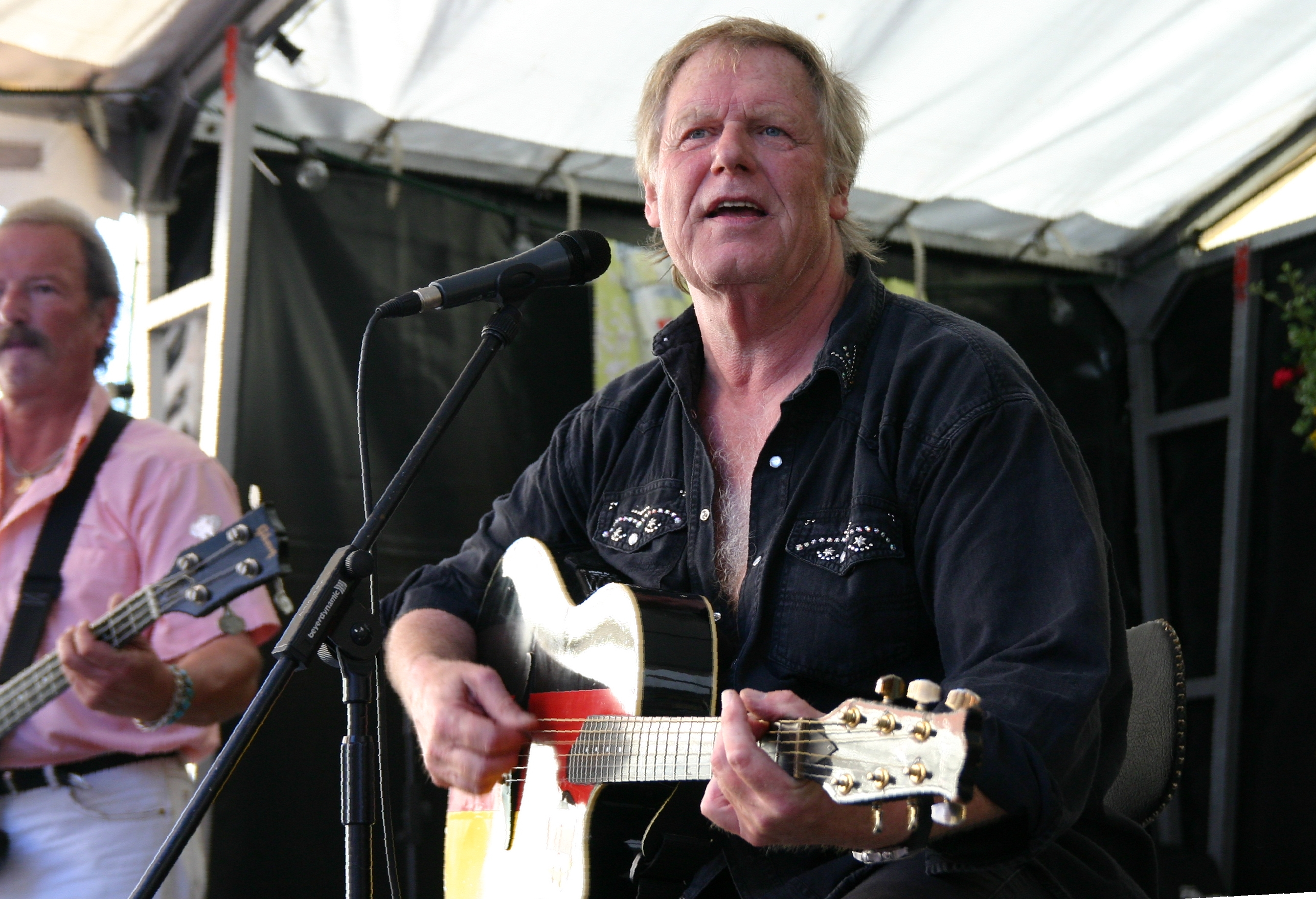 German Country Singer Gunter Gabriel